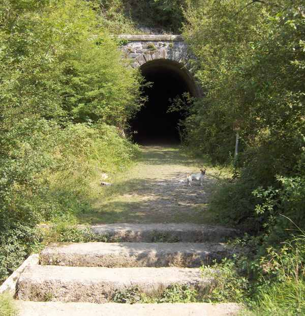 Túnel de Huitzi, del Ferrocarril de Plazaola